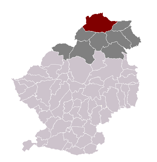 Nomain dans son canton et son arrondissement